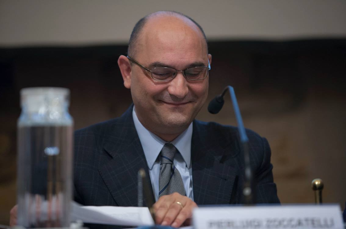 Pierluigi Zoccatelli